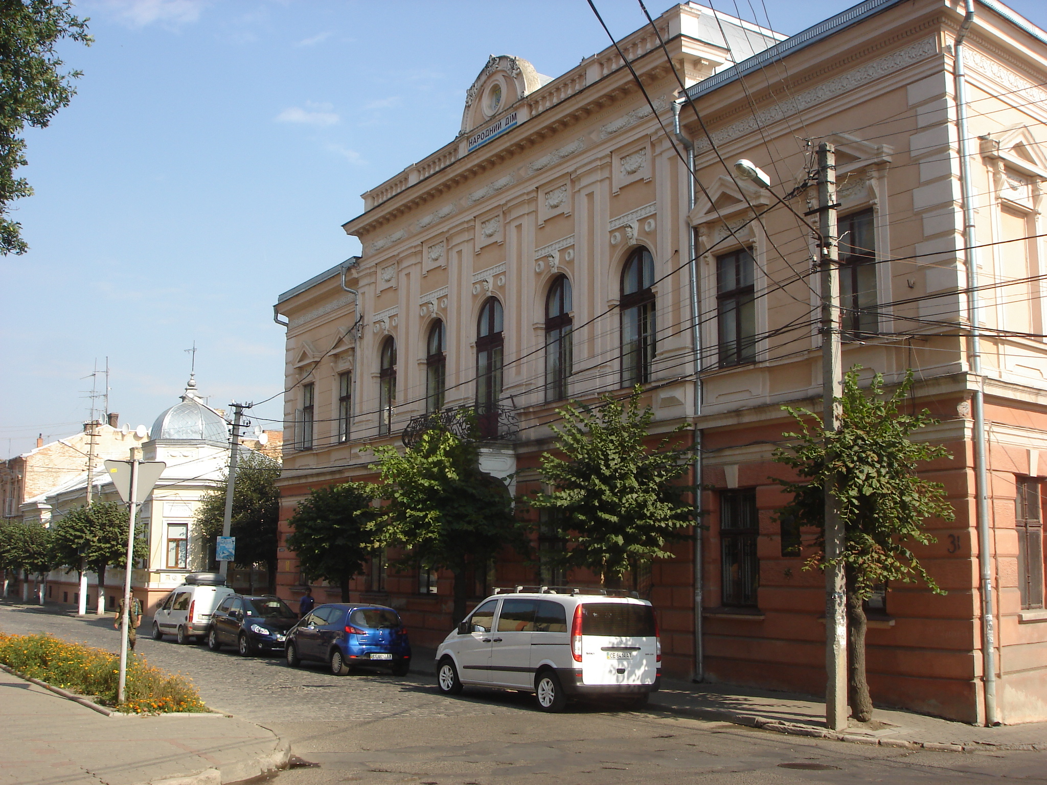 Український_Народний_Дім1.jpg: фото будівлі Українського Народного Дому в Чернівцях. Сучасний вигляд.